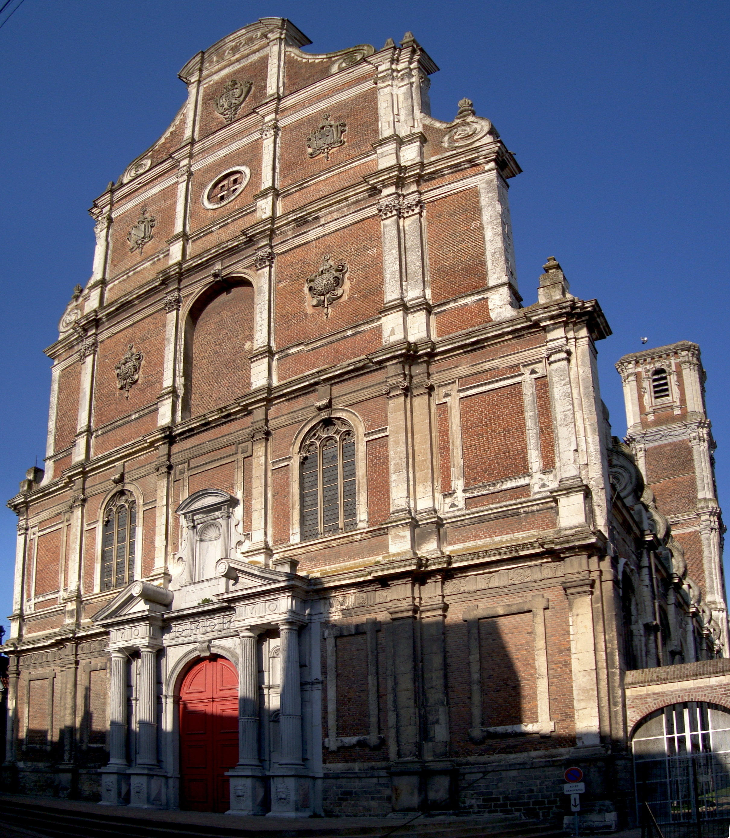 La façade de la chapelle de l’ancien collège des Jésuites Wallons de Saint-Omer (Pas-de-Calais), construite de 1615 à 1640, d’après les plans de Jean Du Blocq. This building is en partie classé, en partie inscrit au titre des Monuments Historiques.